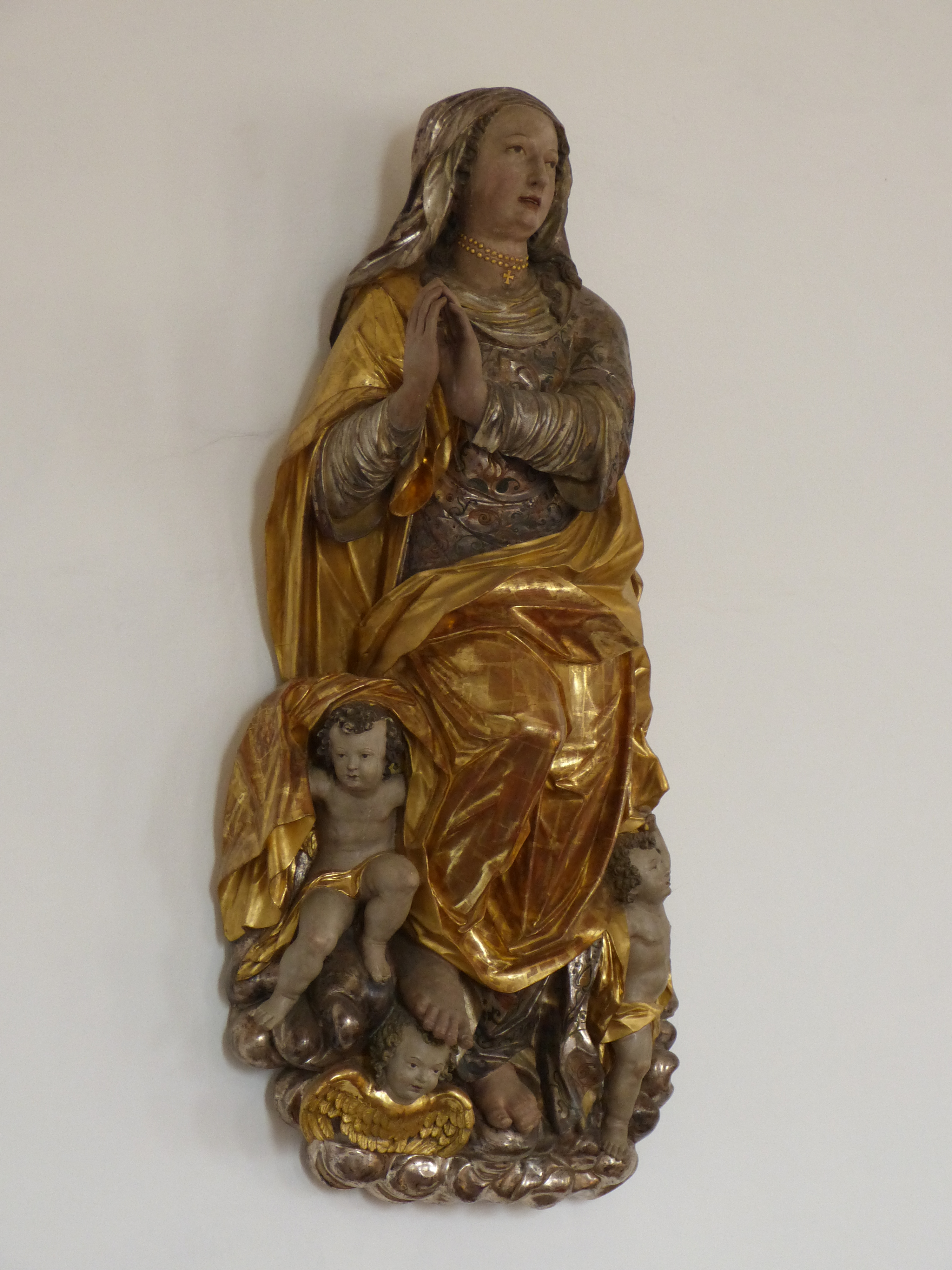 St. Jacobus maior, Markt Rettenbach, Landkreis Unterallgäu, Bayern